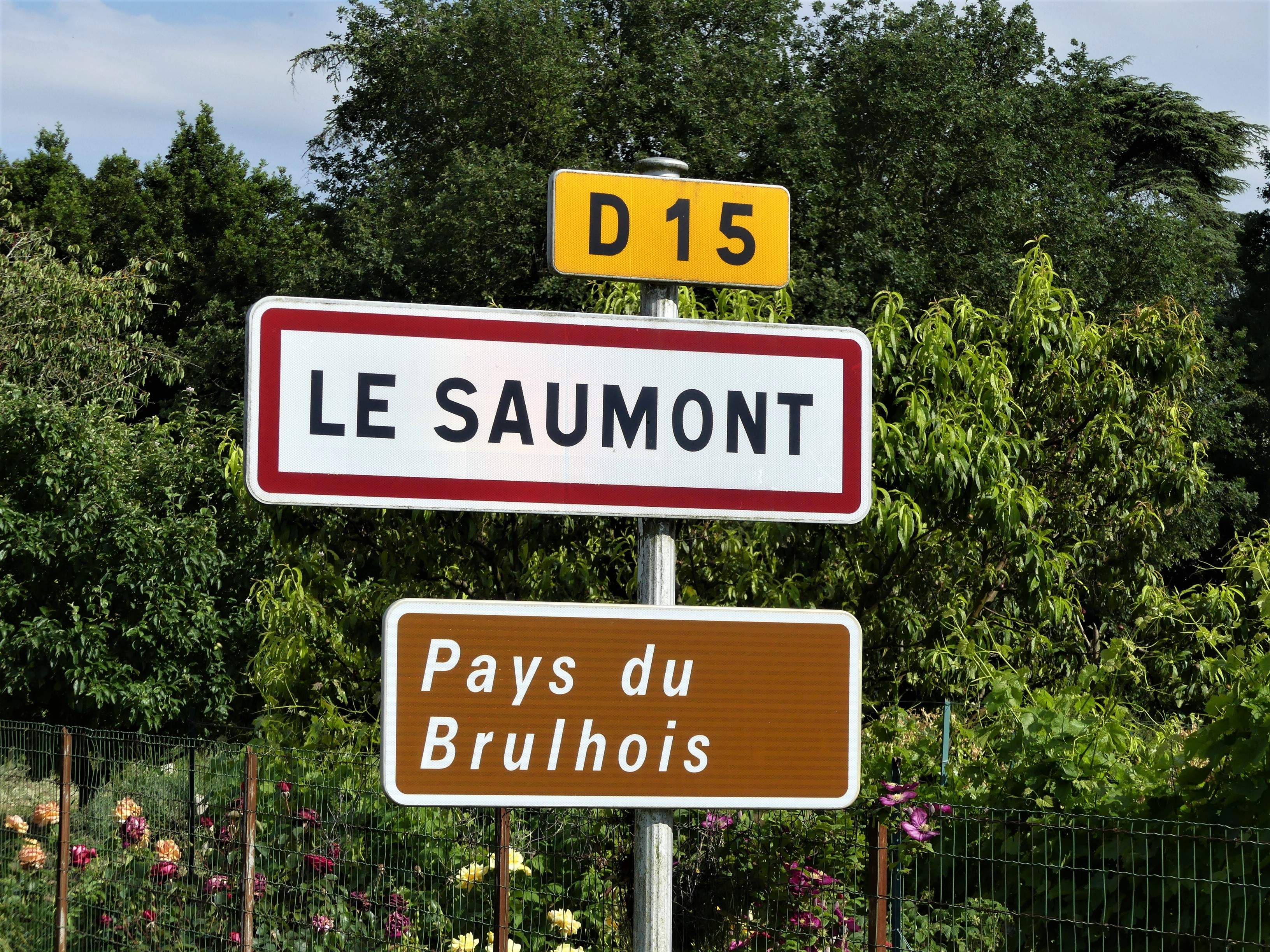 Panneau d'entrée à Saumont, Lot-et-Garonne, France.